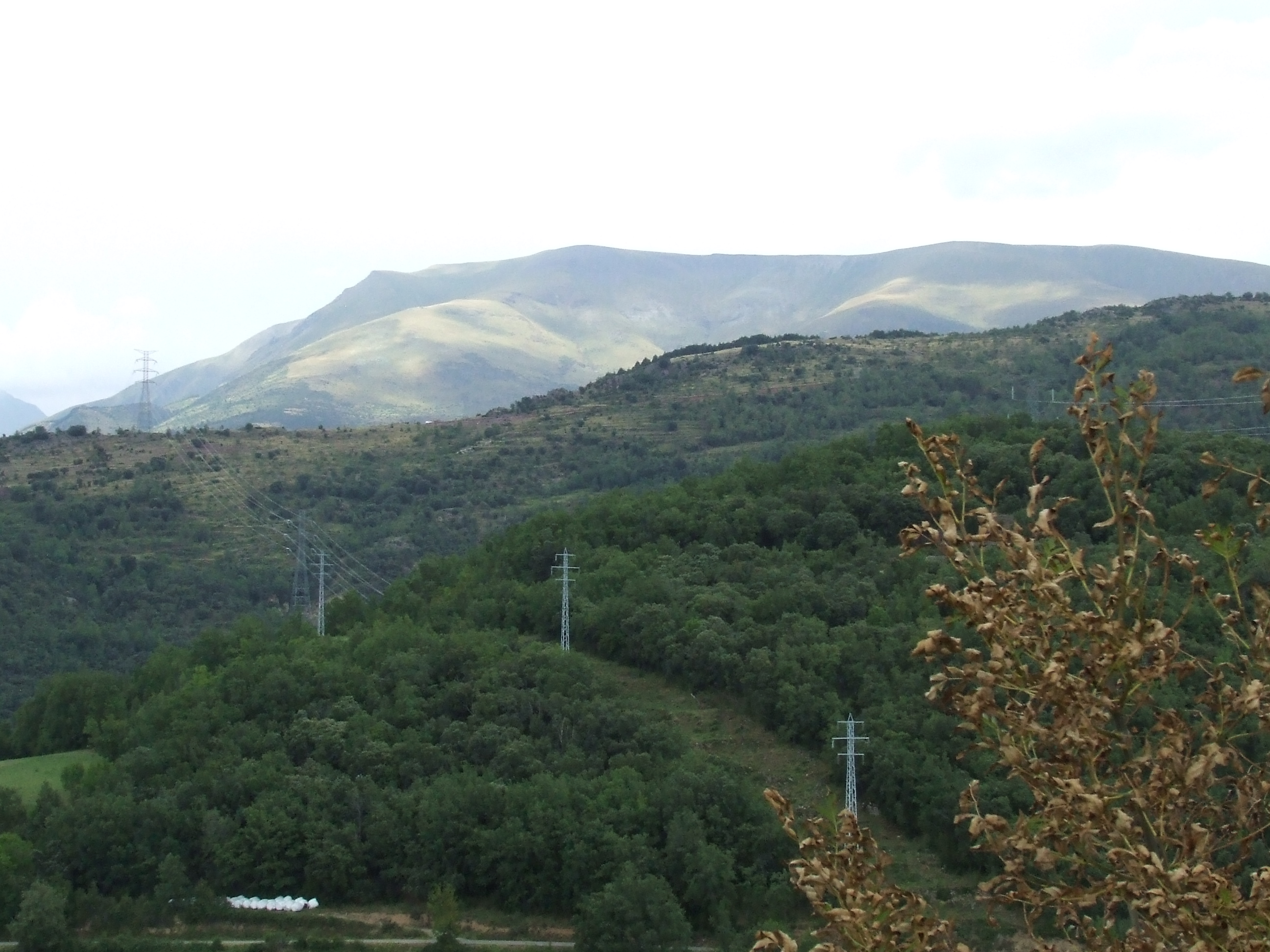 Serra del Rei (Mont-ros, la Torre de Cabdella, Pallars Jussà)